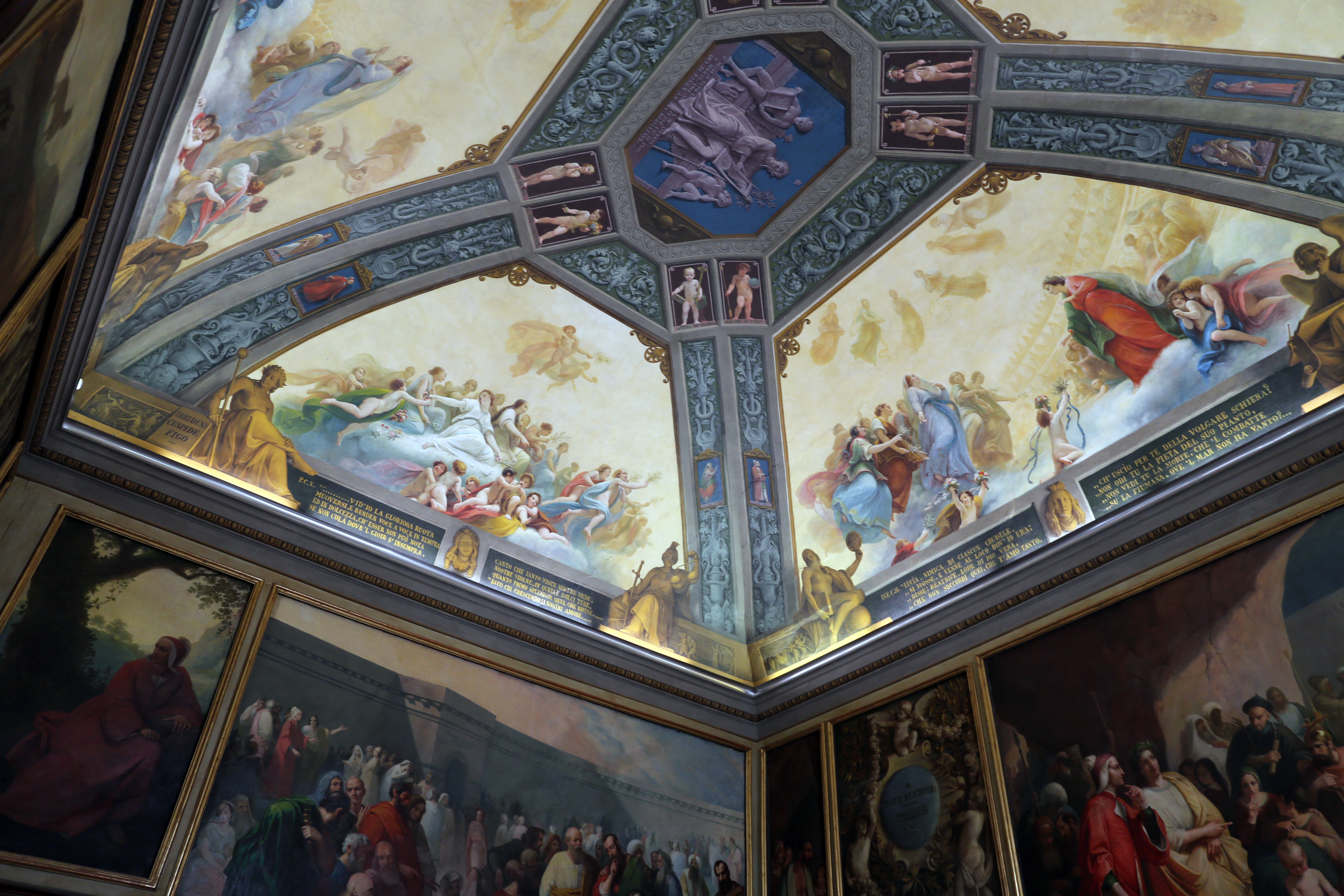 Biblioteca Palatina (Parma) This is a photo of a monument which is part of cultural heritage of Italy.